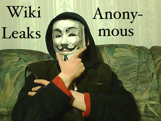 Alexander Klimov als Anonymous-Aktivist (2011)